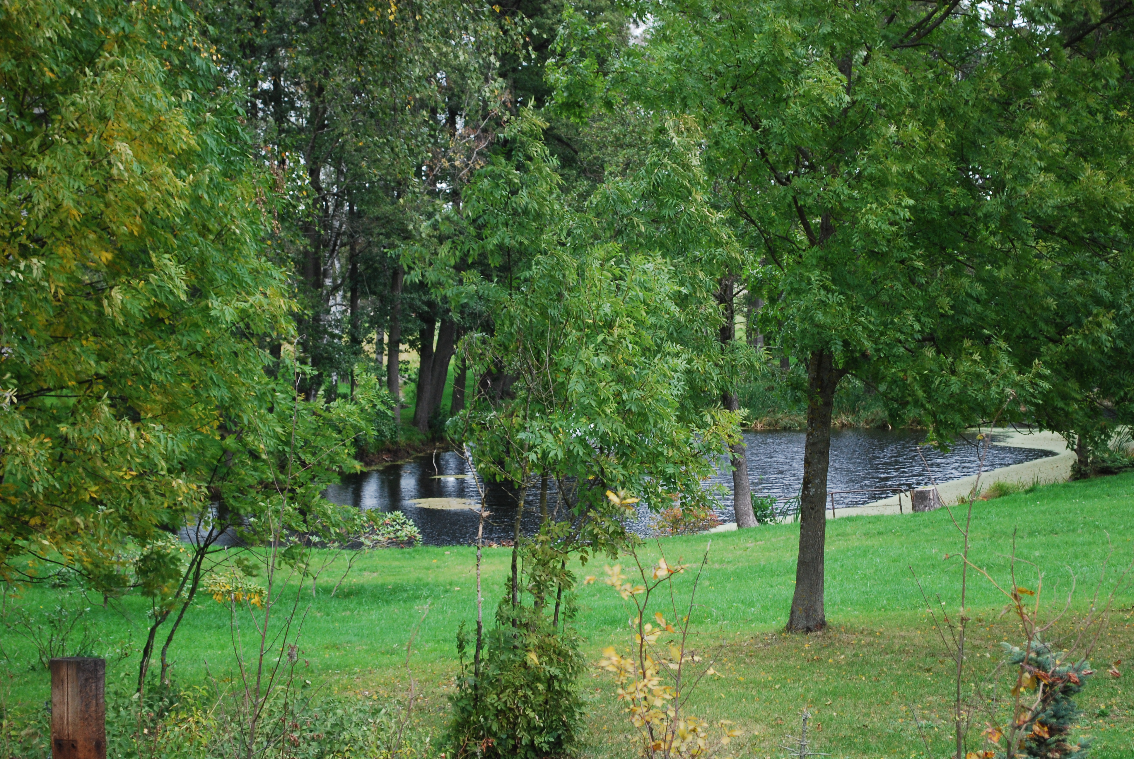 Wężewo, park dworski, XIX, XX